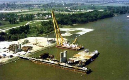 Budapest. A Deák Ferenc híd két kész pillére